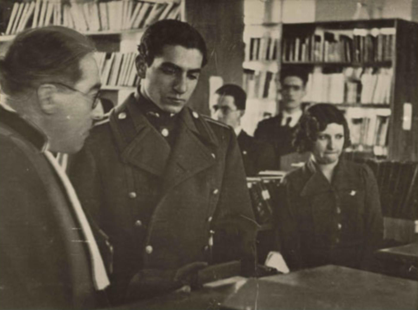 بازدید محمد رضا پهلوی در دوران ولیعهدی از كتابخانه دانشسرای عالی. سمت راست پروین اعتصامی رئیس كتابخانه (۱۳۱۶) Mohammad Reza Pahlavi (At crown prince period) visits Alma Mature University- (Parvin Etesami at his right)-1937